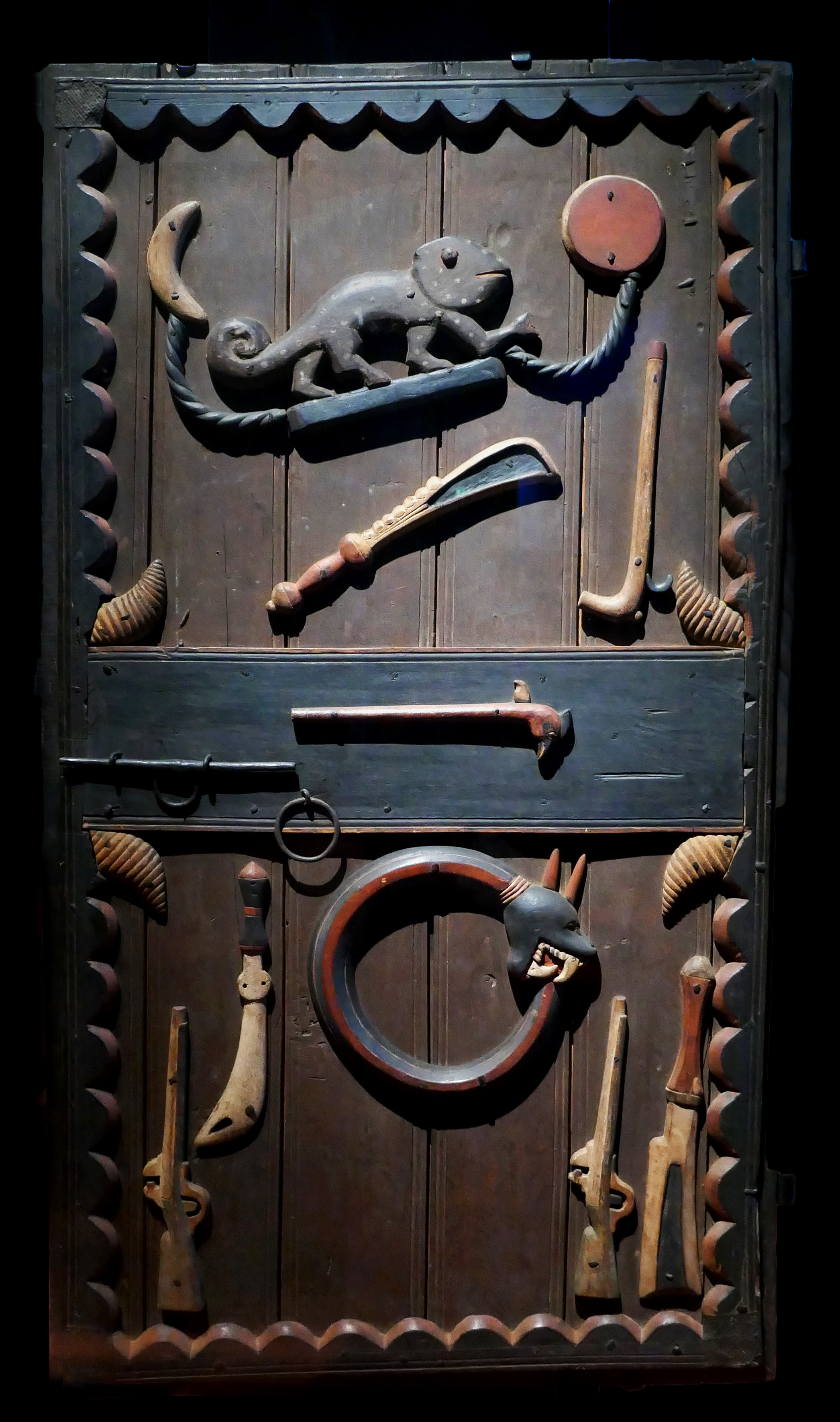 Porte du palais royal d'Abomey Atelier Sossa Dede Date : vers 1889 Bois polychrome, pigments, métal L'une des 4 portes exposées au musée du Quai Branly. N° d'inventaire : 71.1893.45.6